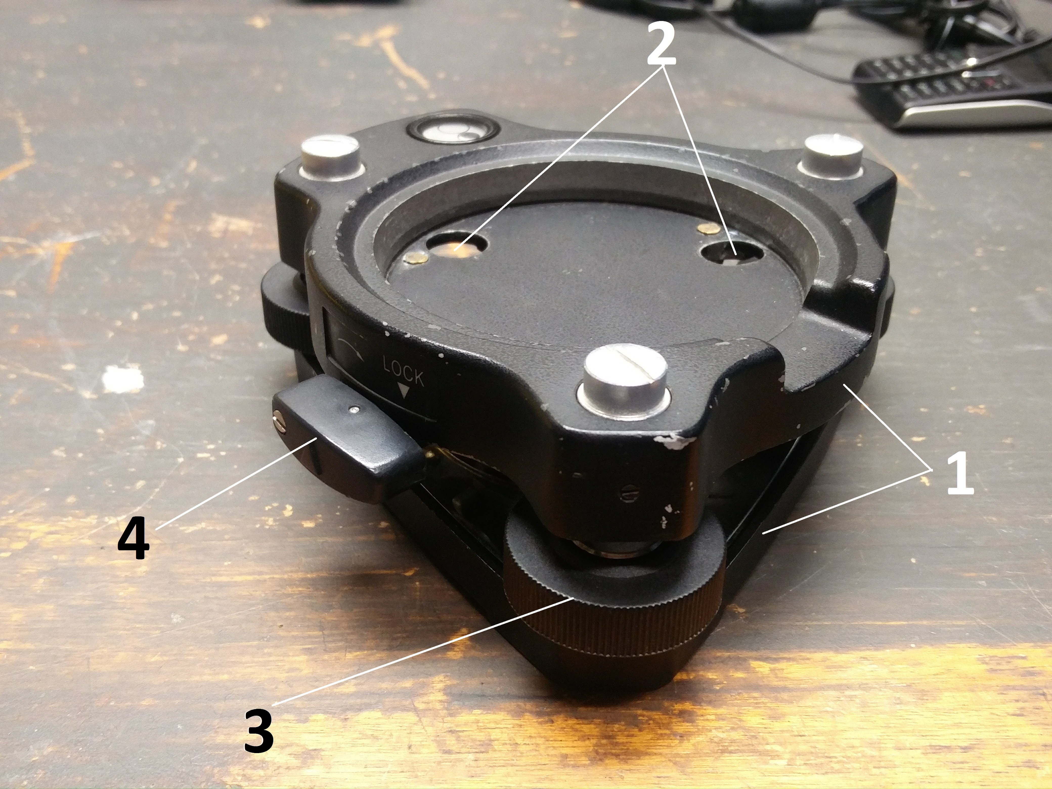 1. Alumine ja ülemine kolnurkne metallplaat 2. Tahhümeetri kinnitusaugud 3. Peenliigutuskruvi 4. Tahhümeetri lukusti